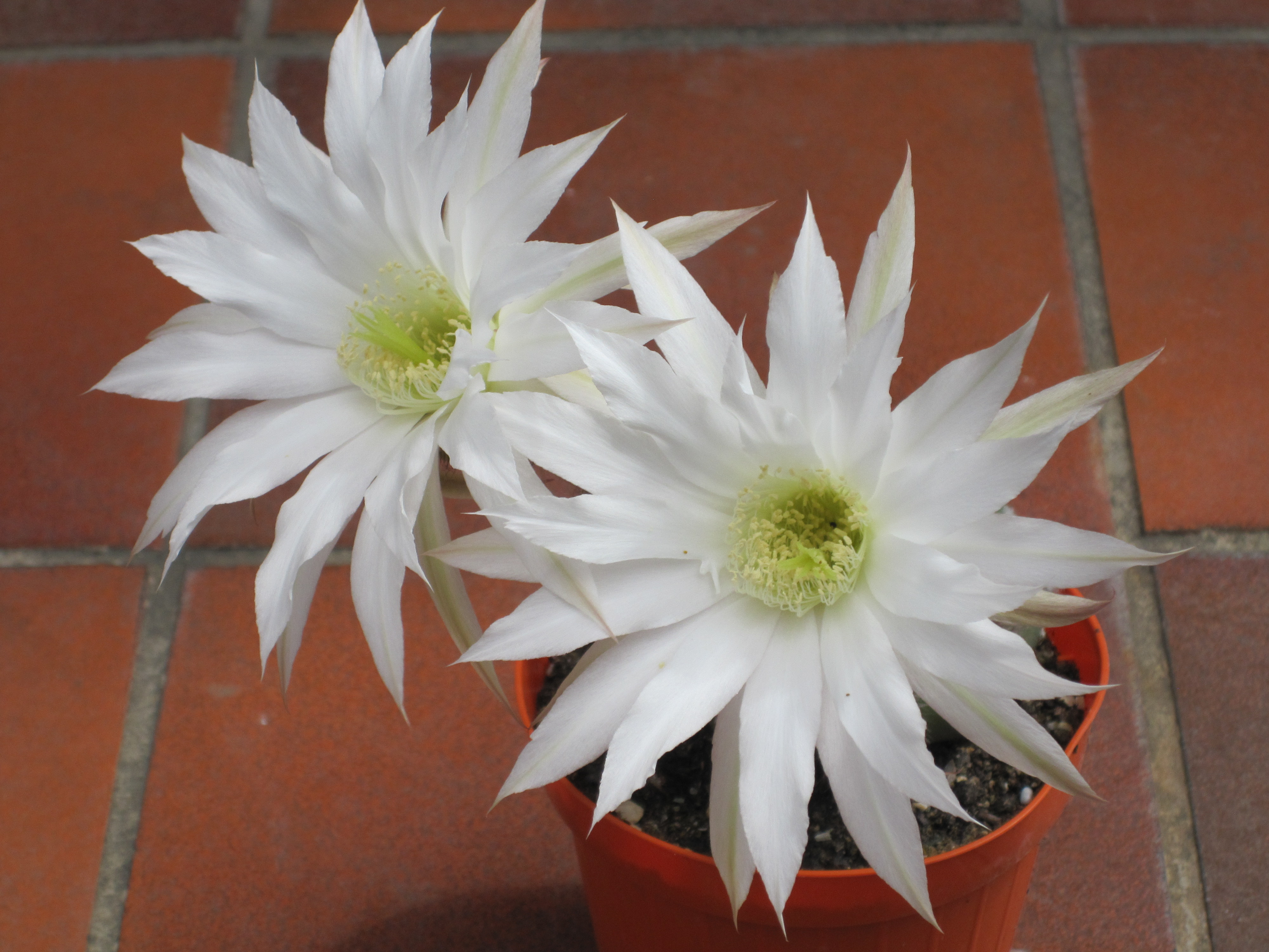 Una pianta di echinopsis subdenudata in fiore